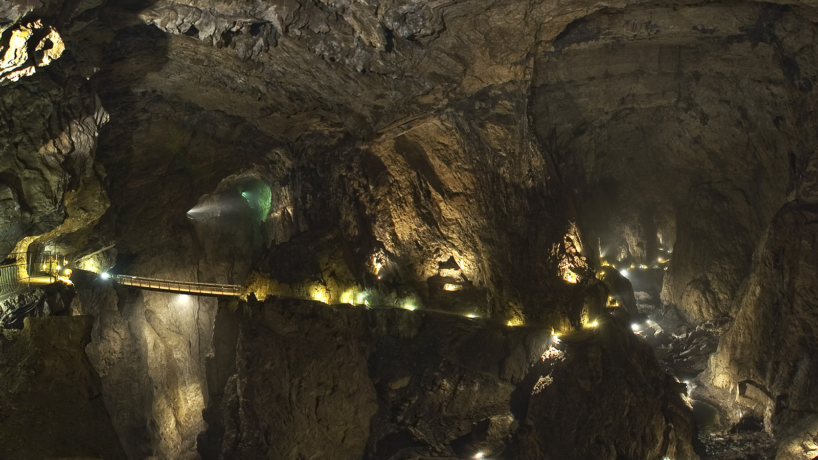 Podzemni tok reke Reke v Škocjanskih jamah. Fotografirano junija 2006 z dovoljenjem Regijskega parka Škocjanske jame in Ministrstva za okolje in prostor RS.